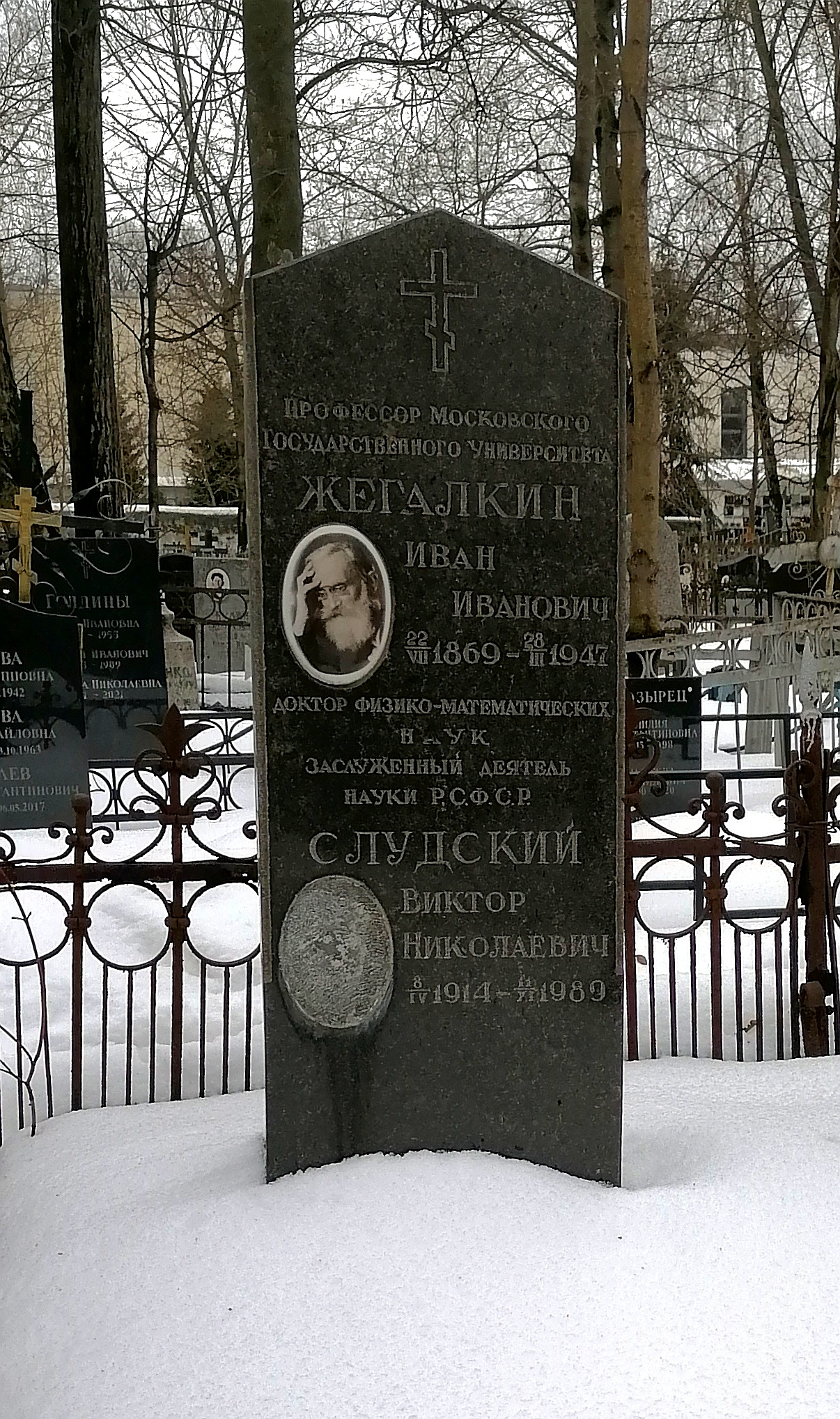 Могила математика Ивана Жегалкина на Ваганьковском кладбище Москвы.